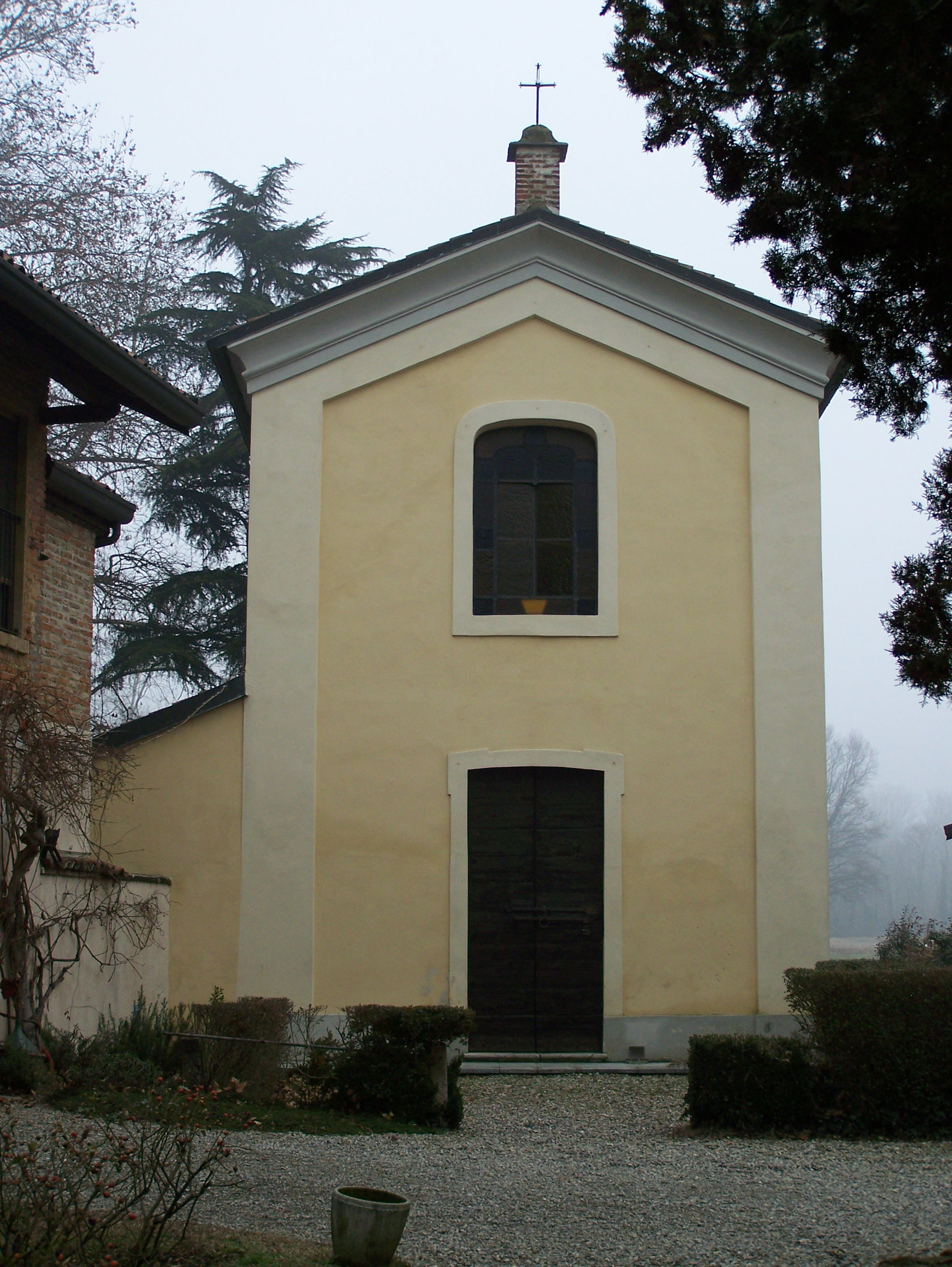 Chiesa di Santa Teresa a Riazzolo, frazione di Albairate (MI)